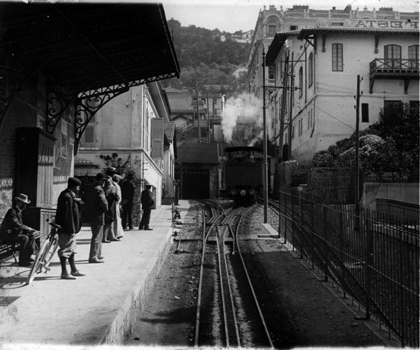 Fonds Trutat - Photographie ancienne Cote : TRU C 2670 Localisation : Fonds ancien (S 30) Original non communicable Titre : Arrivée d'un train en gare, voyageurs sur les quais, Monte-Carlo [vers 1905] Auteur : Trutat, Eugène Rôle de l’auteur : Photographe Lieu de création : Monte-Carlo (Monaco) Date de création : 1905 Mesures : : 8,5 x 10 cm Mot(s)-clé(s) : -- Gare -- Quai -- Entrée -- Train -- Fumée -- Voie ferrée -- Voyageur -- Attente -- Homme -- Costume masculin -- Maison -- Poteau -- Electricité -- Grille -- Monte-Carlo (Monaco) -- Monaco (Principauté de) -- 20e siècle, 1e quart Médium : Photographies -- Positifs sur plaque de verre -- Noir et blanc -- Scènes -- Paysages urbains Bibliothèque de Toulouse. Domaine public